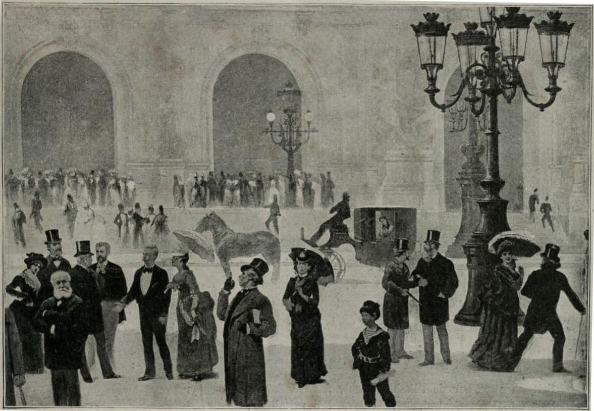 Planche du livret explicatif du panorama le "Tout-Paris" peint par Charles Castellani et présenté lors de l'exposition universelle de 1889.